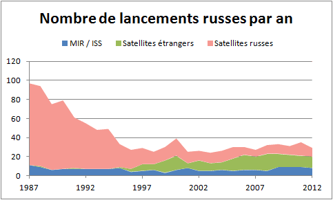 Nombre de lancements soviétiques et russes par an entre 1987 et 2012 avec ventilation par type d'engin placé en orbite : satellites soviétiques/russes, engins liés au programme spatial habité (MIR et Station spatiale internationale/ISS), satellites étrangers. Le schéma illustre l'effondrement de l'astronautique soviétique qui précède et suit l'éclatement de l'Union soviétique. Sont intégrés les lancements Sea Launch et les tirs des lanceurs devenus ukrainiens (Dnepr, Zenit).